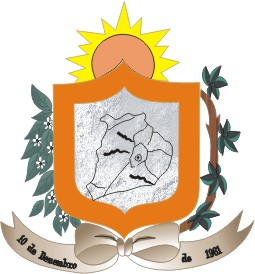 Brasão da cidade de Areial, Paraíba, Brasil